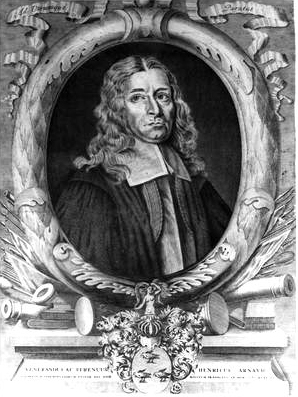 Portrait du Colonel et Pasteur Henri ARNAUD d'Embrun dit Monsieur de la TOUR (Torre Pellice)